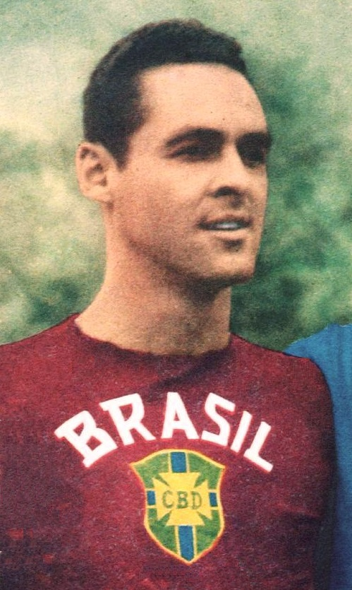 Gilmar Dos Santos Neves en 1959.